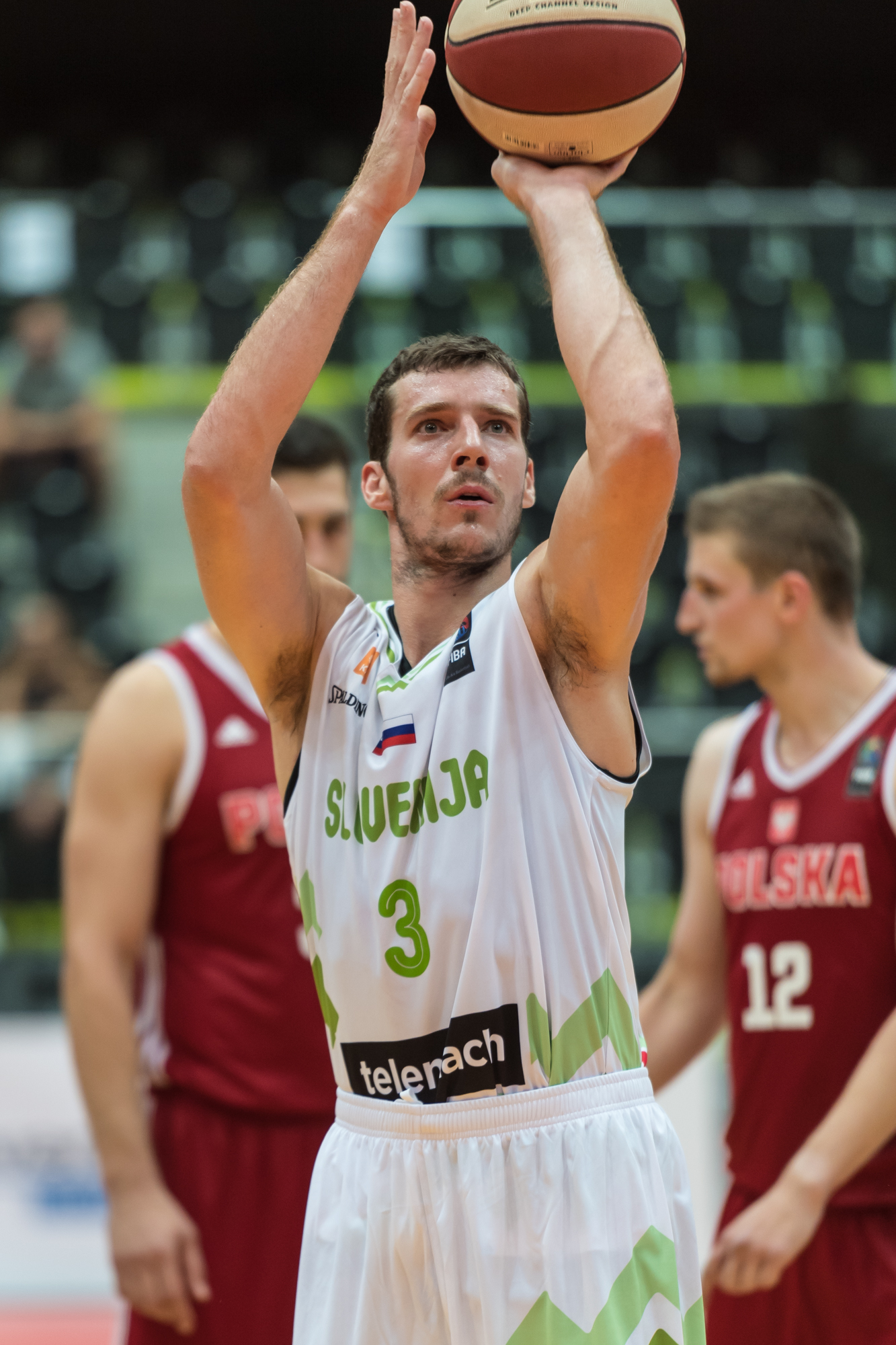 ÖBV Vier-Nationen-Turnier vom 12.-14. August 2016 in Schwechat: Slowenien vs Polen. Bild zeigt Goran Dragic (SLO).